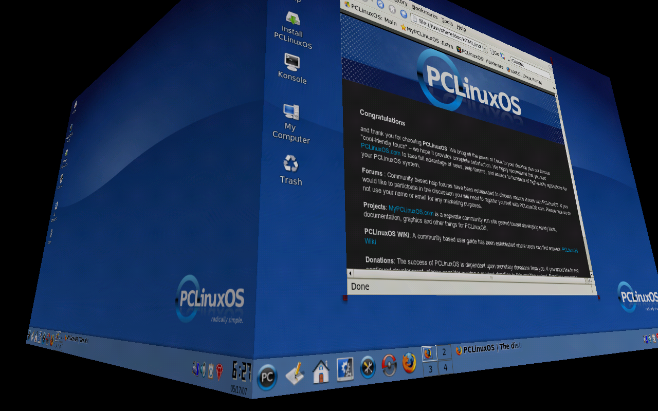 Captura de la distribución Linux "PCLinuxOS" mostrando el escritorio en "cubo".